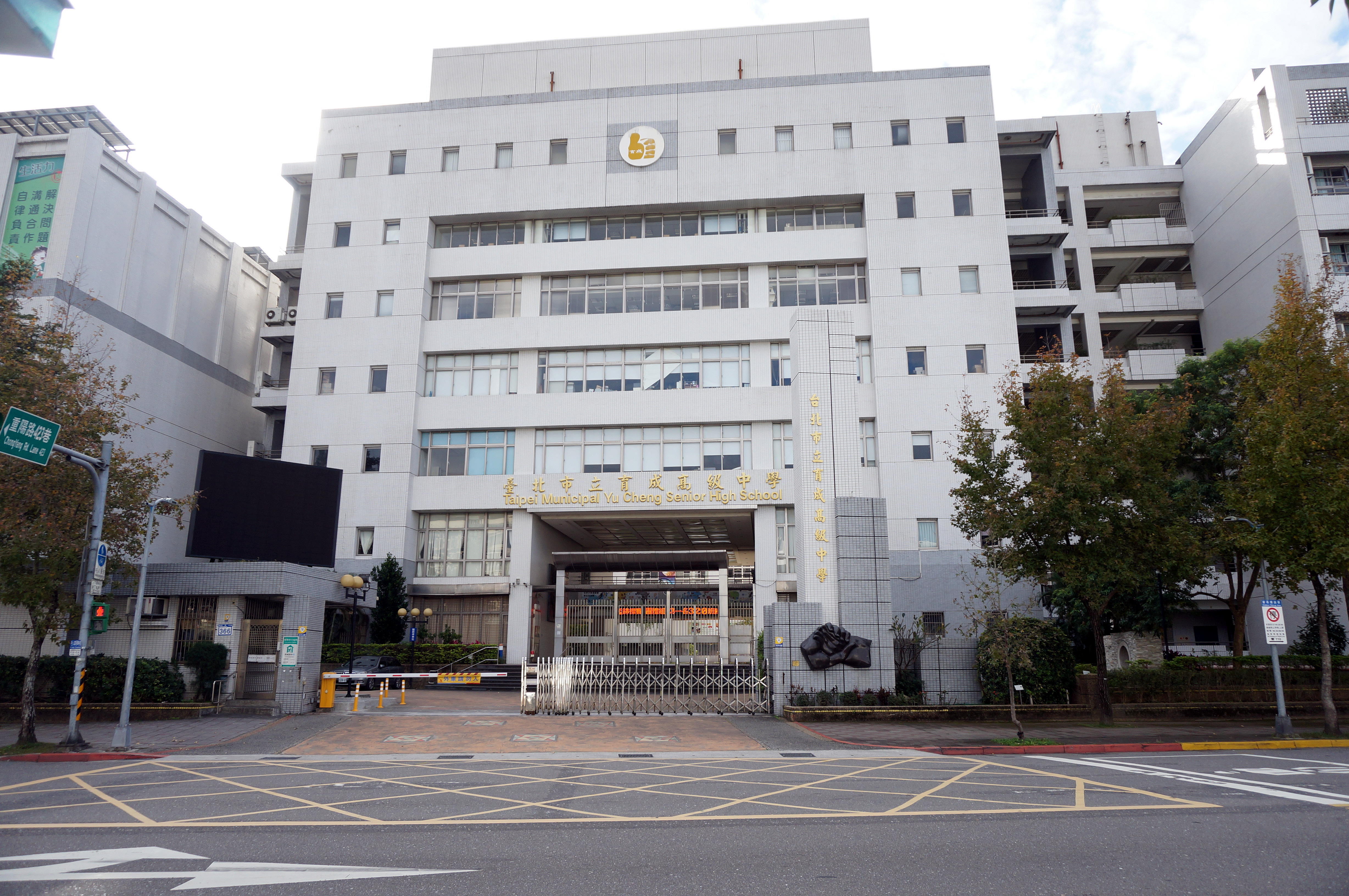 臺北市立育成高級中學大門。